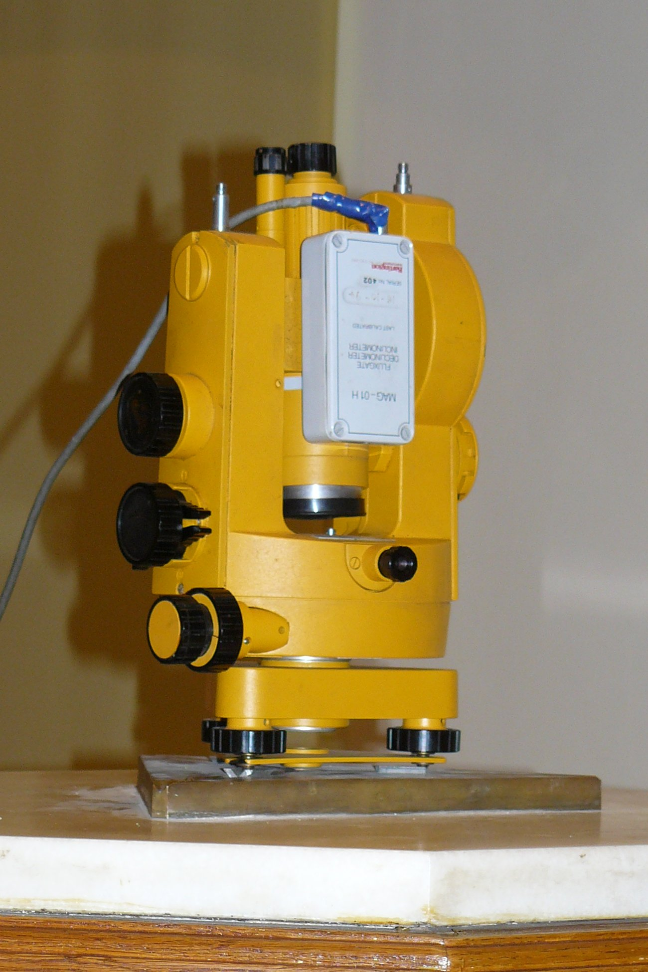 Surlari Geomagnetic Observatory, Flux declinometer/inclinometer Bartington.